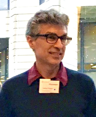 Yoshua Bengio